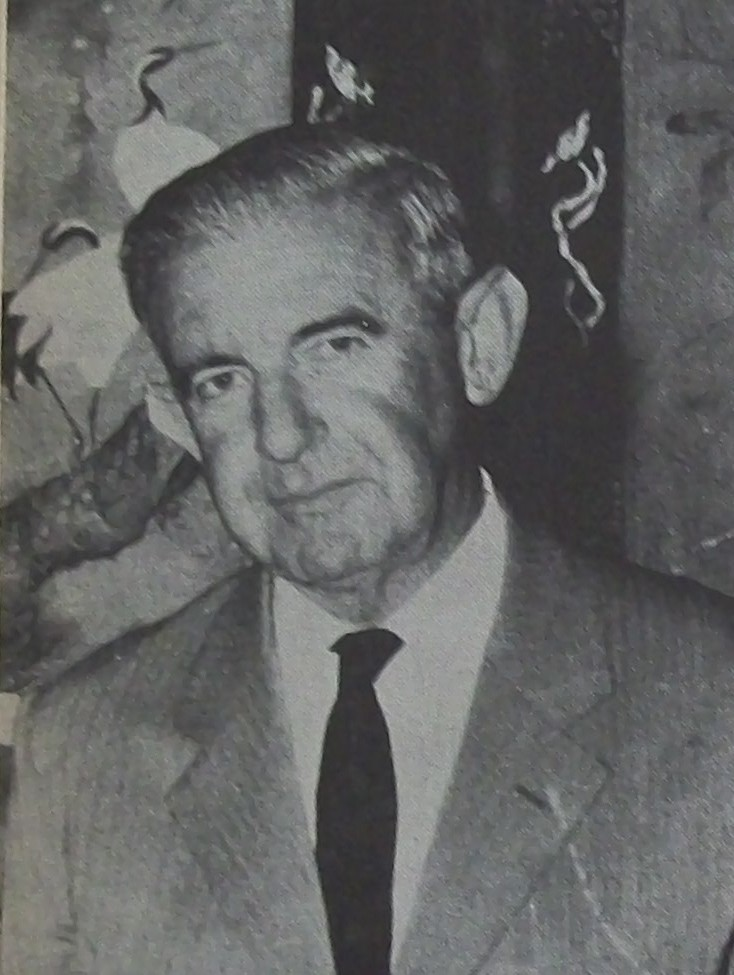 Eduardo González Lanuza